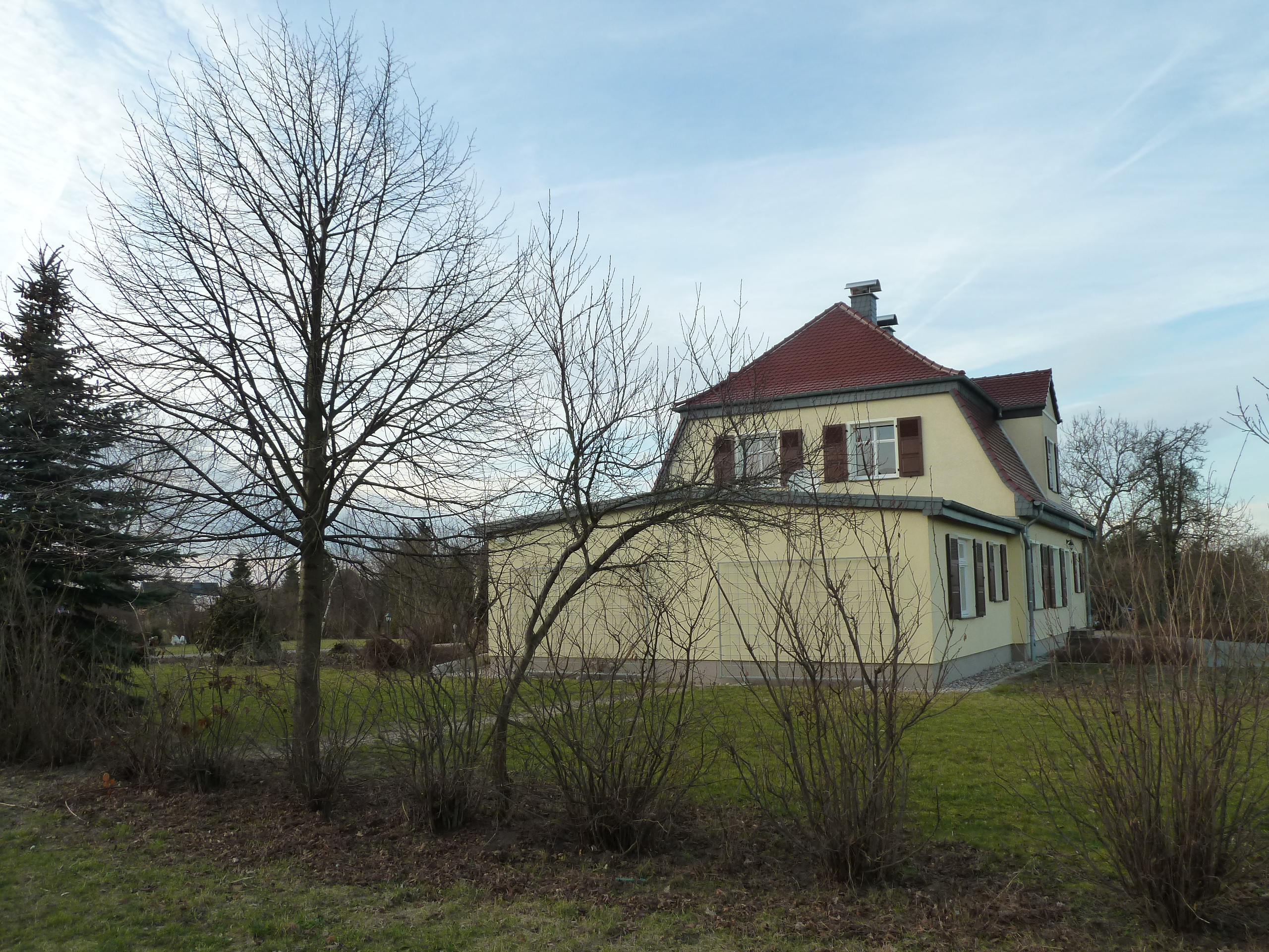 ehem. Bahnhof Karow (östliches Sachsen-Anhalt)